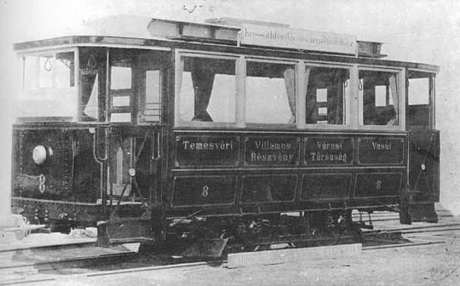 Typ A Nr. 8